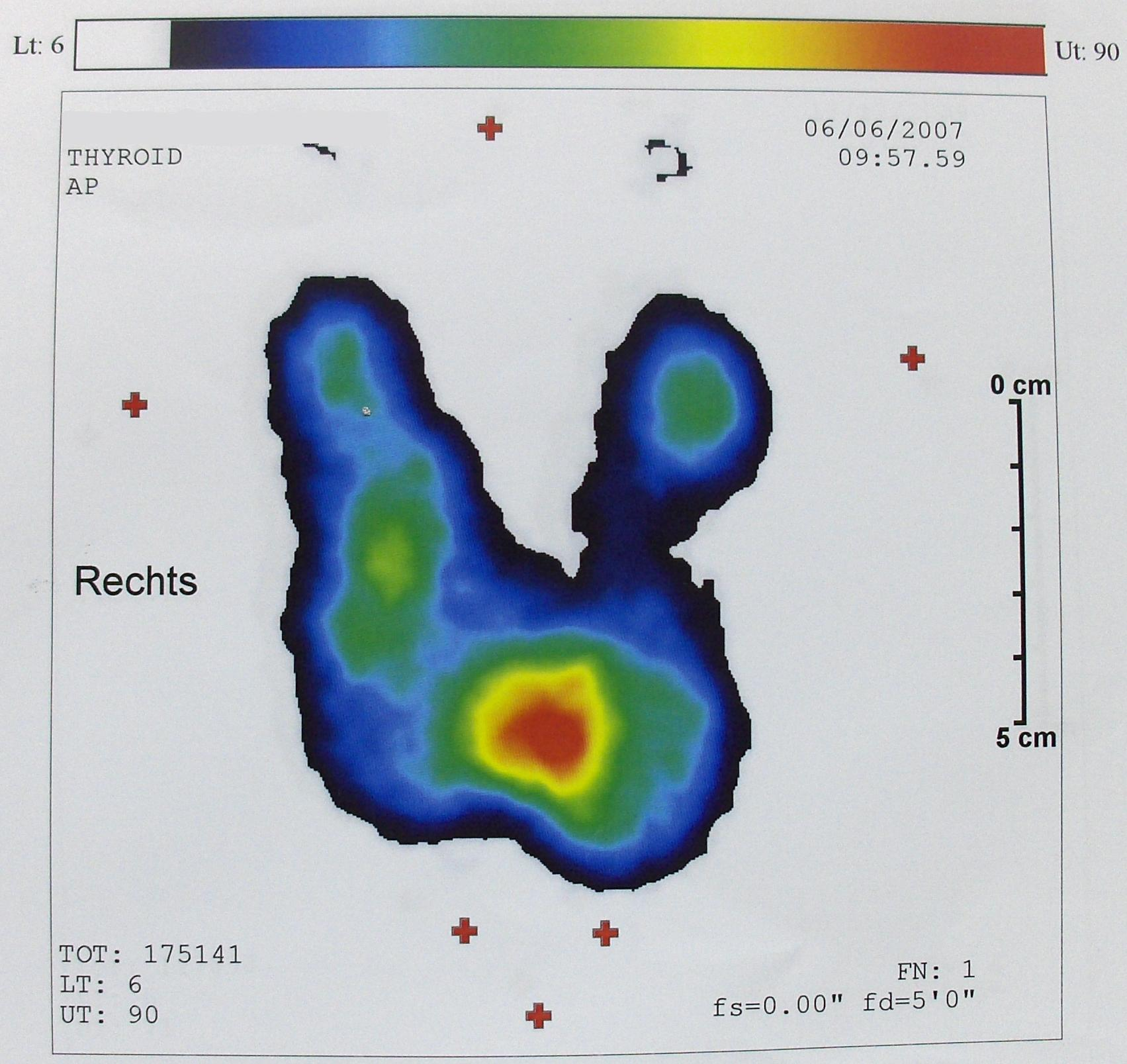 99m-Technetium-Szintigramm einer Struma mit vier autonomen Adenomen